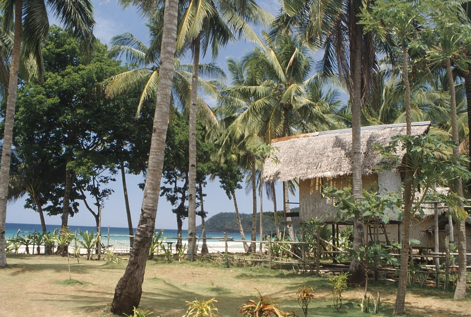 Palawan: Tropical hut